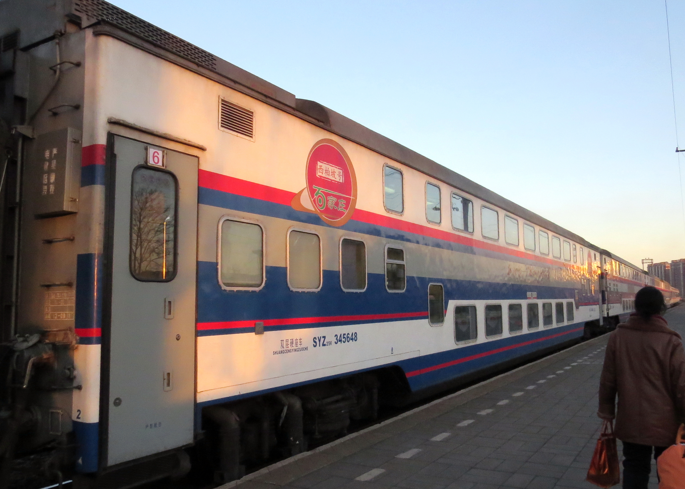 Y514/511次列车使用的双层25K型硬座车在密云北站